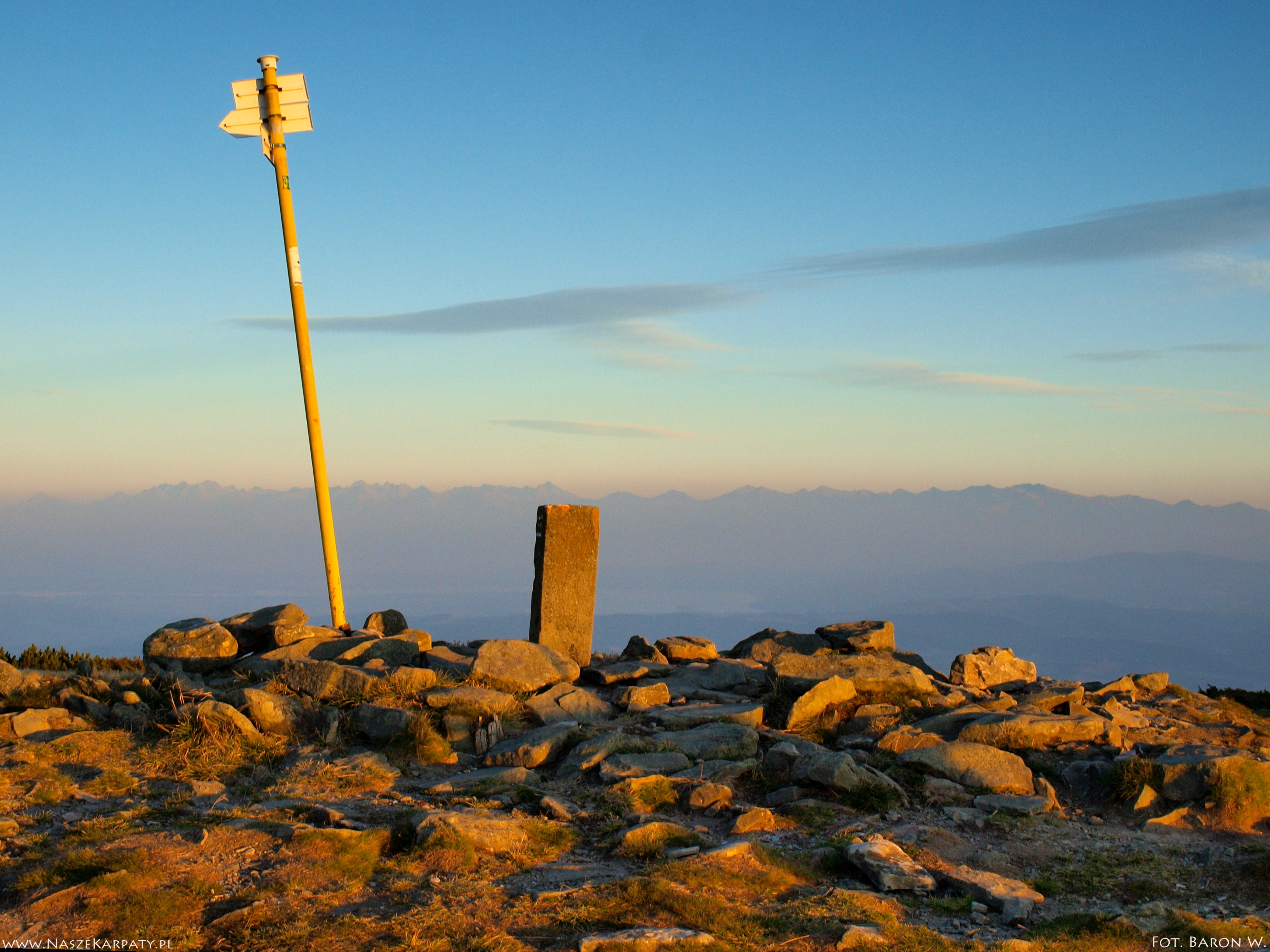 Szczyt Pilska